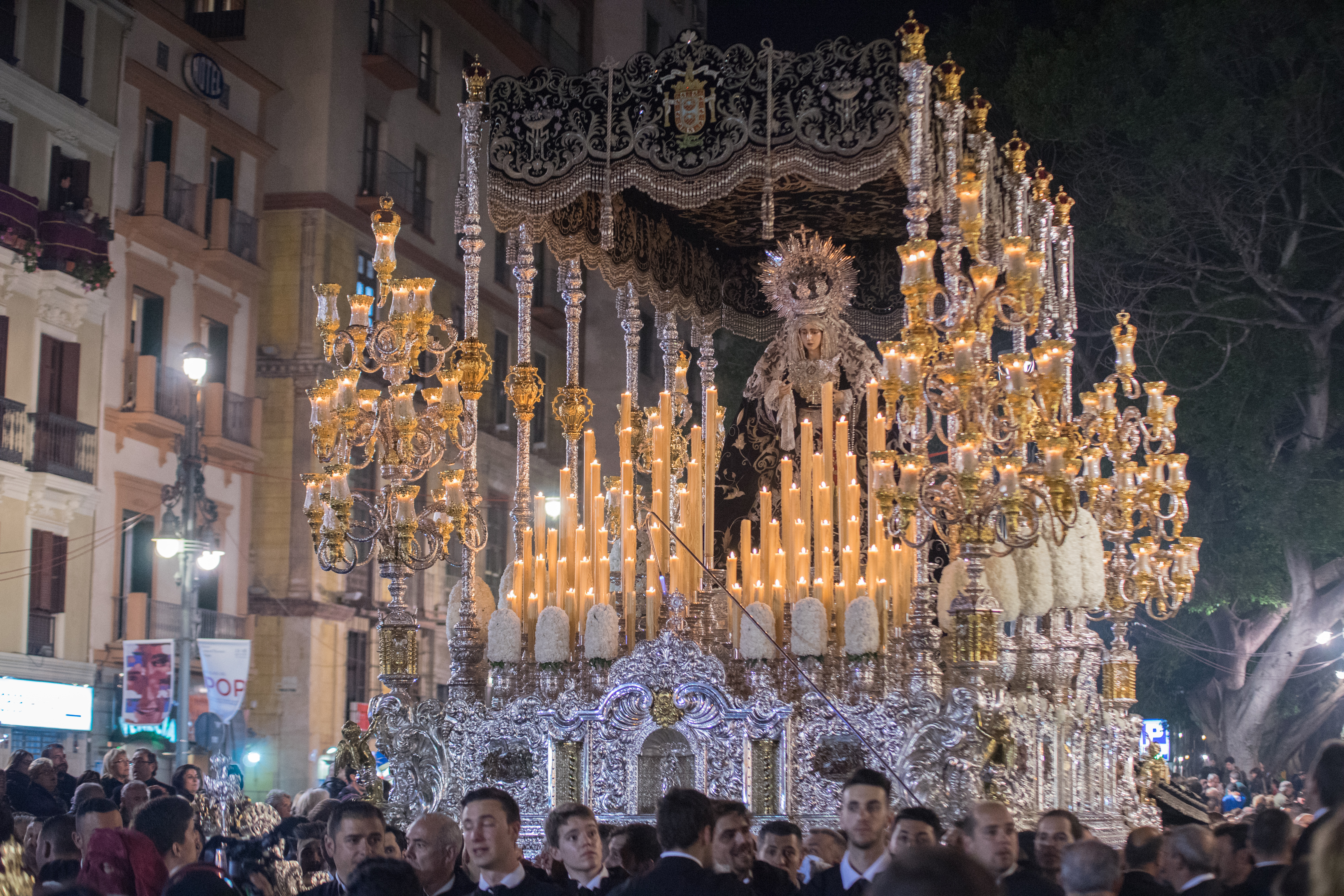 Real Ilustre y Venerable Cofradía de Nuestro Padre Jesús de la Misericordia, Santo Cristo de Animas, Nuestra Señora del Gran Poder y San Juan de Dios This is a photography of a Folklore festival in Spain (Wikidata id Q9075883).